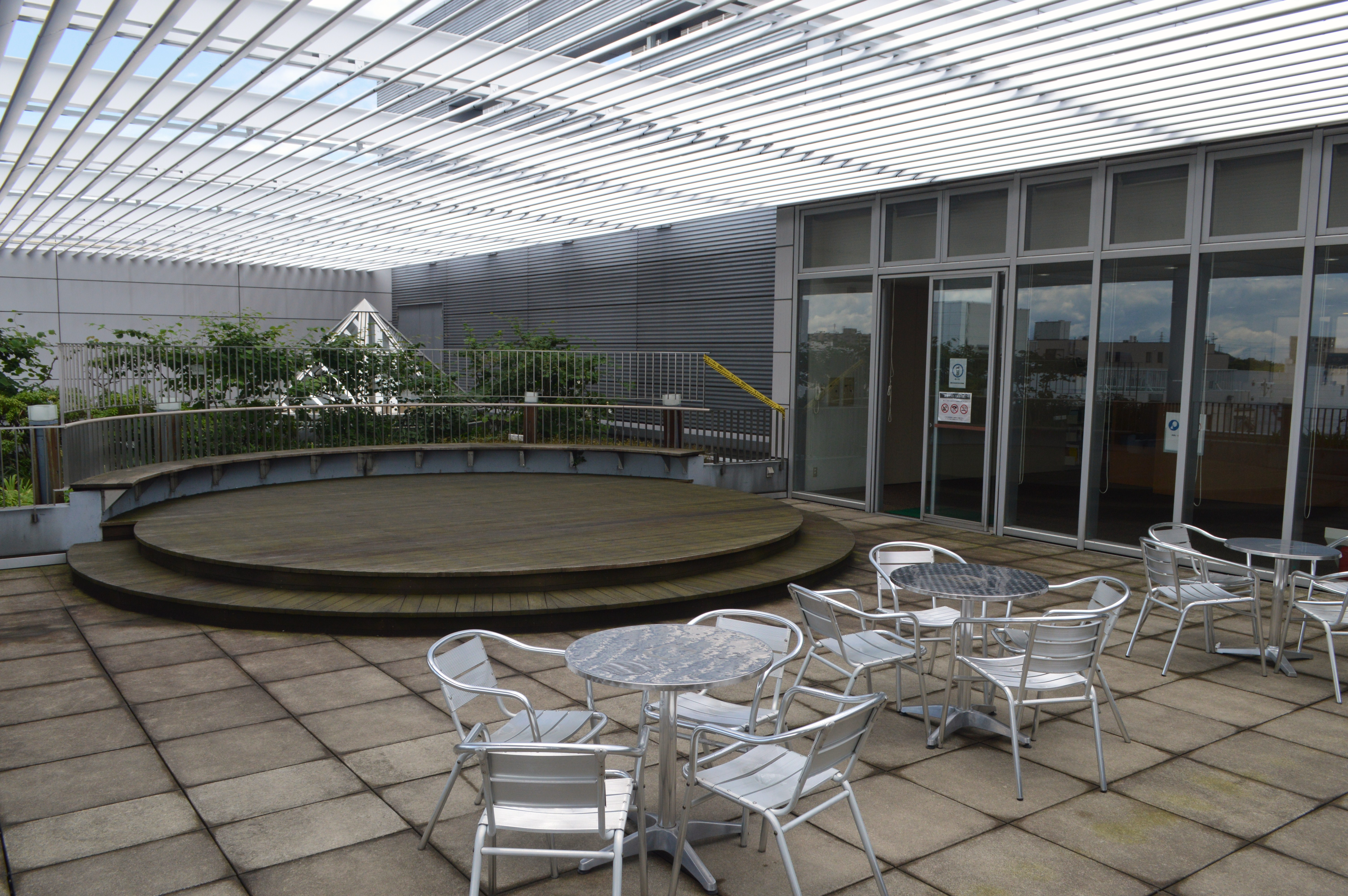 桑名市立中央図書館4階のテラス